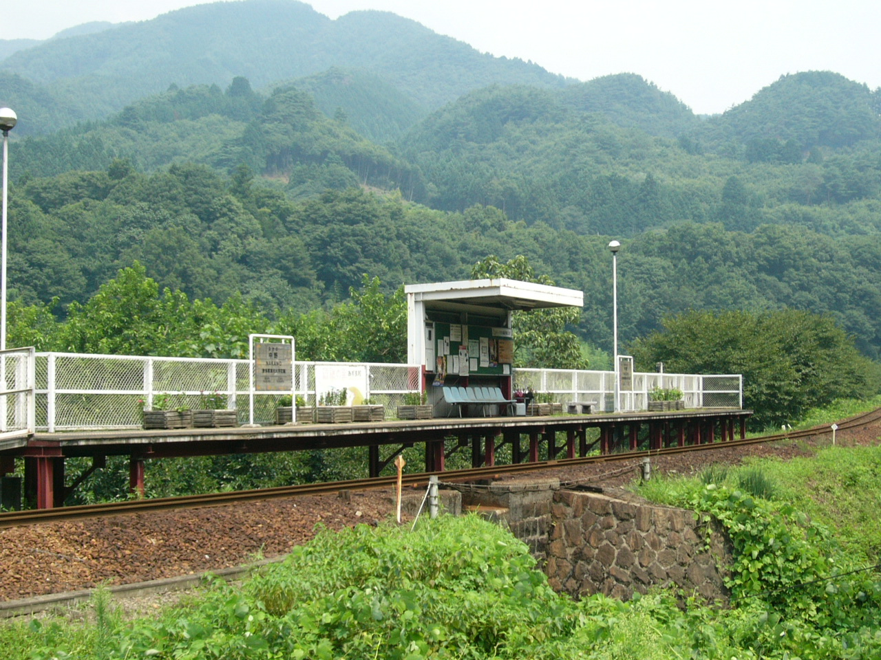 Nakano Station